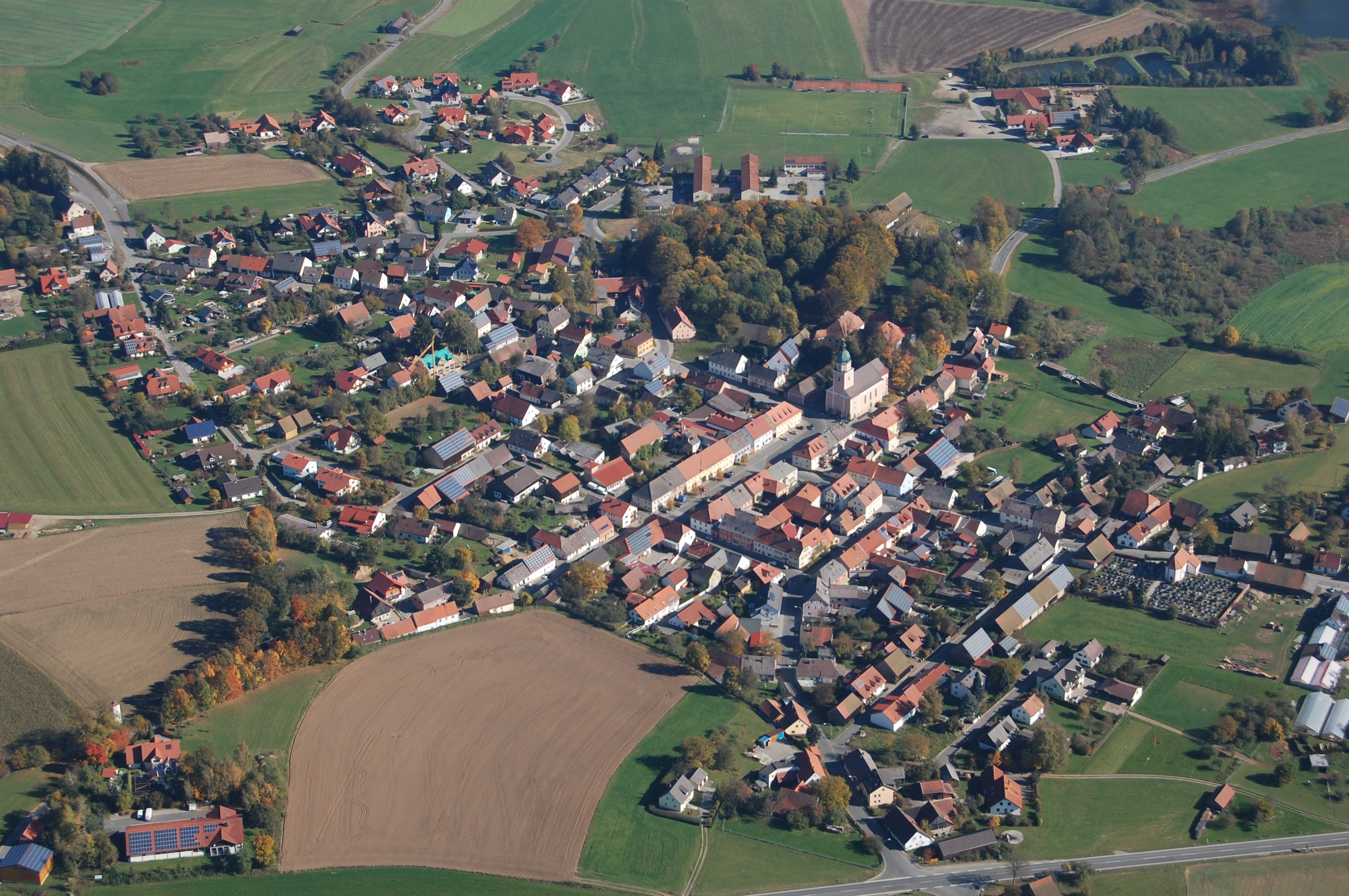 Markt Winklarn (Landkreis Schwandorf, Oberpfalz)